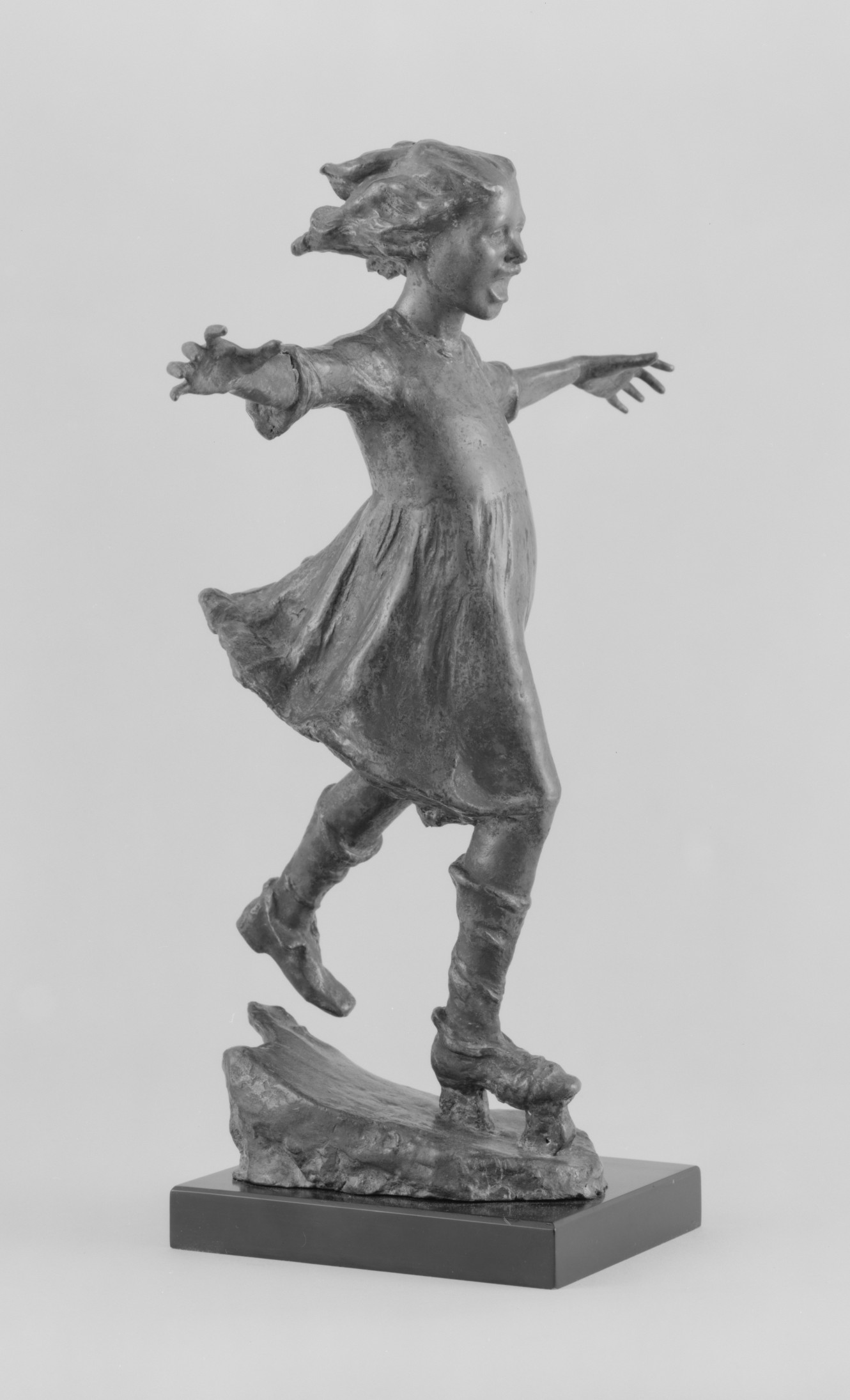 Sculpture; Sculpture